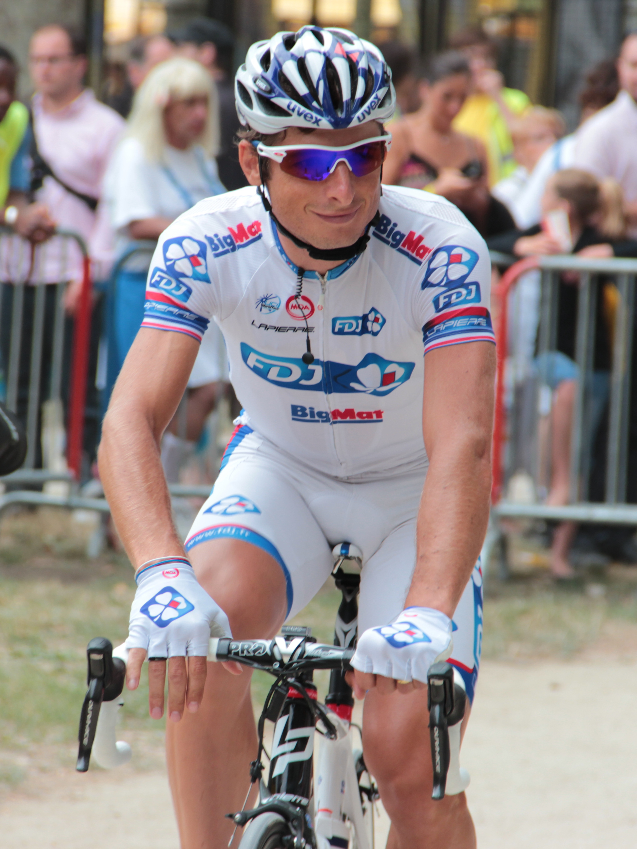 Pierrick Fédrigo avant le départ de la 18e étape du Tour de France 2012.